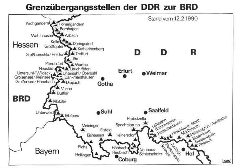 ADN-ZB-Grafik-15.2.90-roe- Berlin: Die Grenzübergänge zwischen der DDR und der BRD nach Hessen und Bayern.